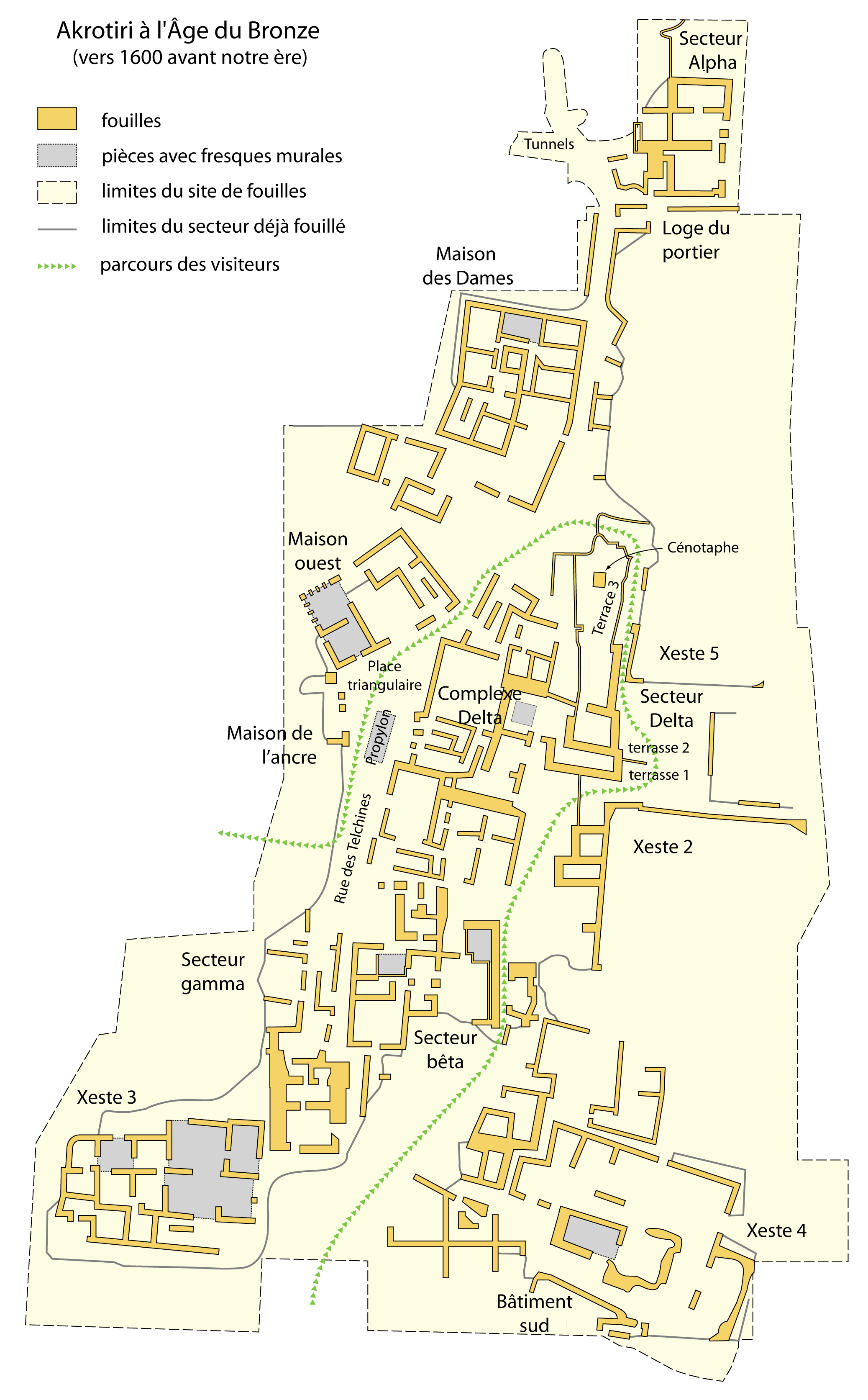 Carte d'Akrotiri à l'Âge du Bronze, v. 1600 av. J.-C.